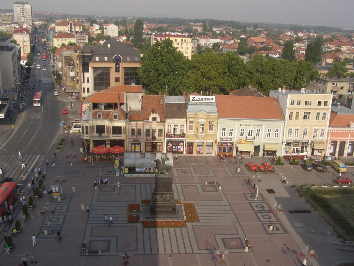 Niš